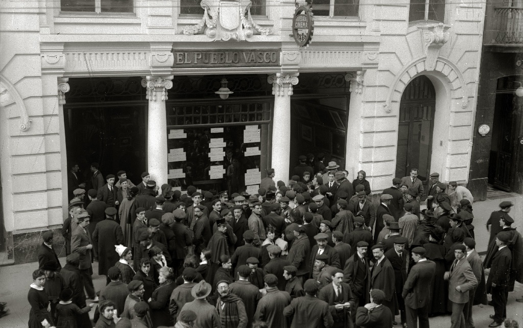 Título original: Público agolpado ante la redacción de 'El Pueblo Vasco' (1/1) Localización: San Sebastián (Guipúzcoa)